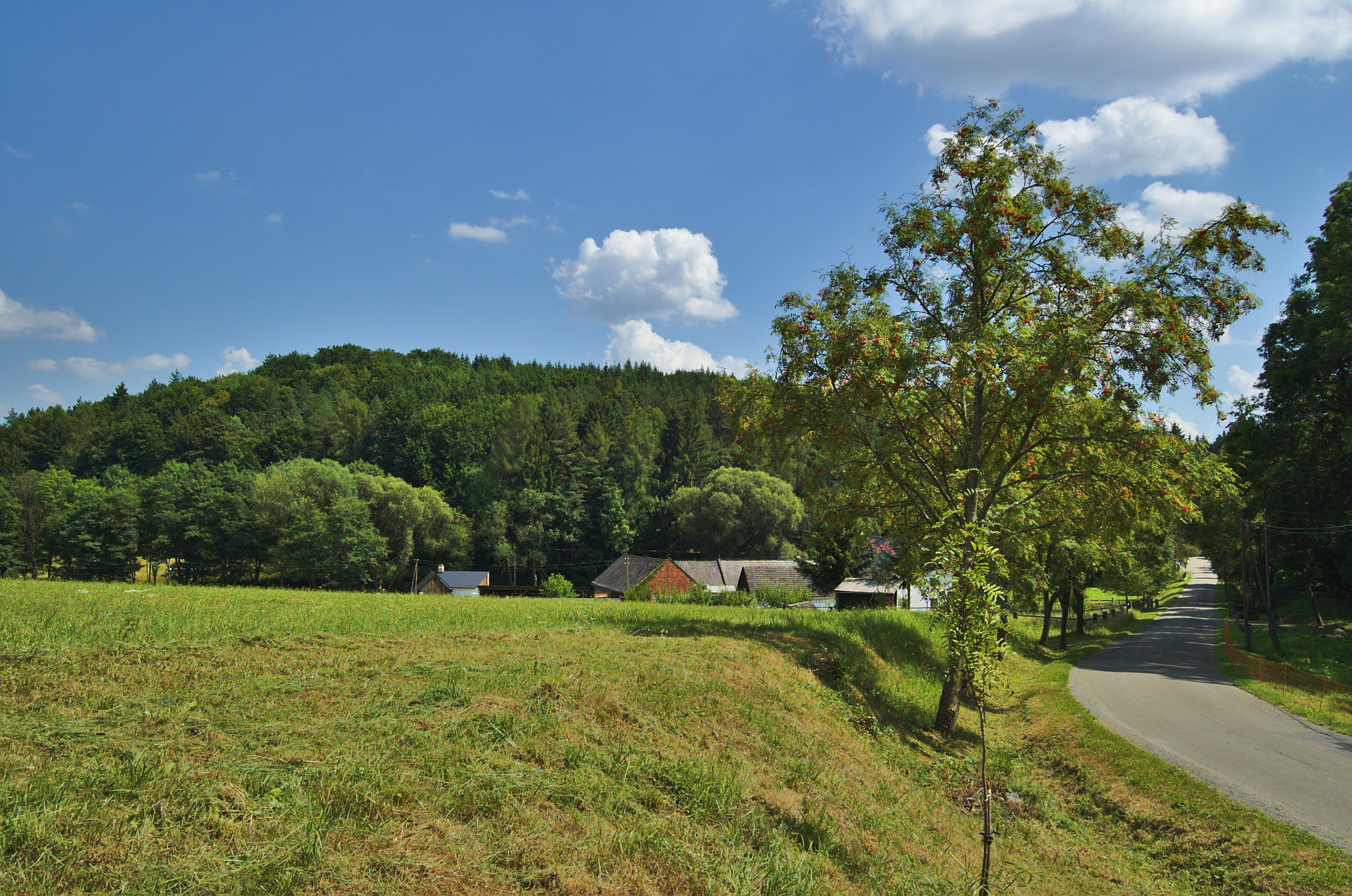 Přírodní památka Taramka - pohled z druhé strany údolí, okres Prostějov